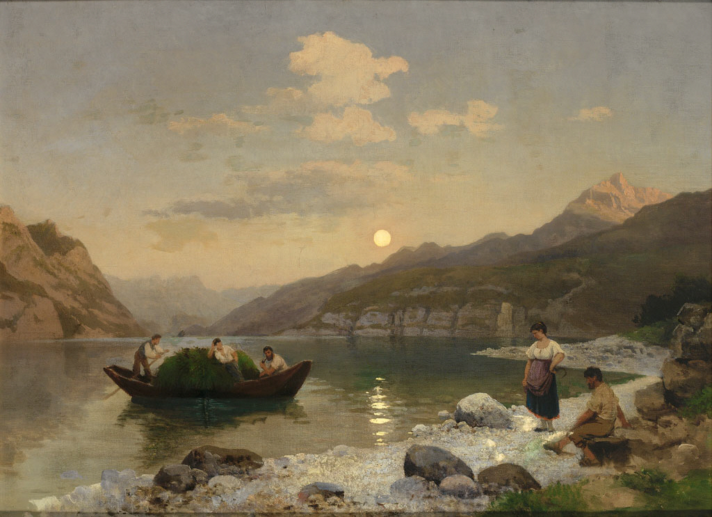 Georg Saal: Norwegische Fjordlandschaft im Mittsommer, Öl auf Leinwand, 70,5 x 100 cm